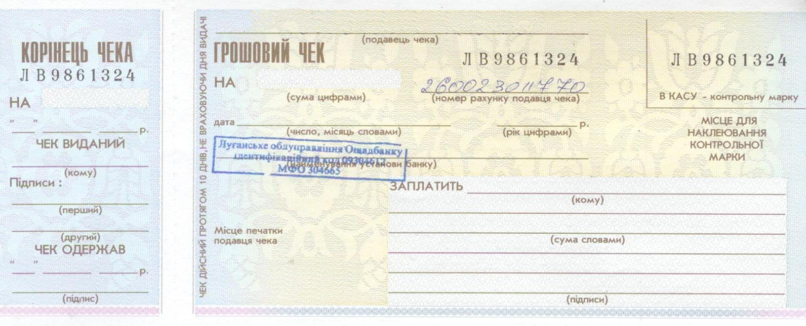 Іменний чек Ощадбанку України